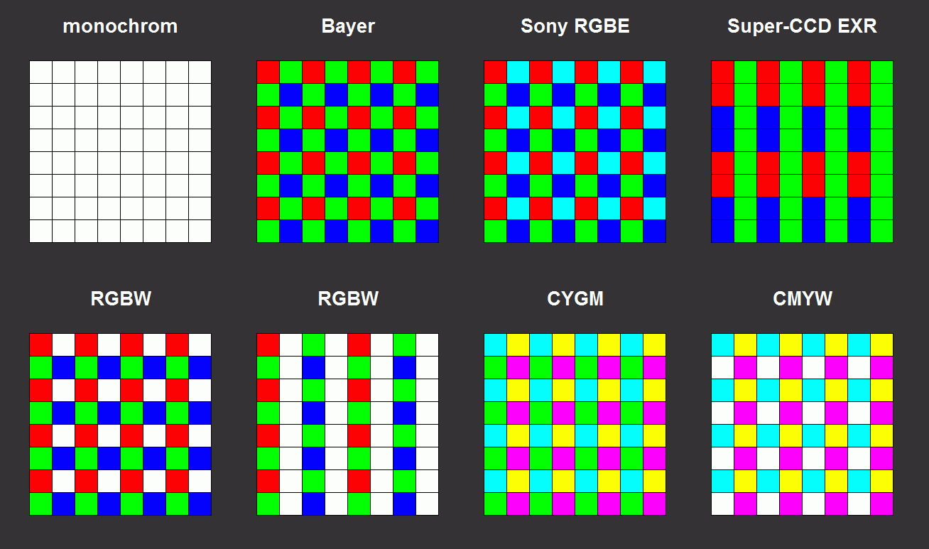 Color Filter Pattern for One-Chip Color Cameras. Nichtrechteckige CFAs gehen leider nicht mit Excel zu "malen"